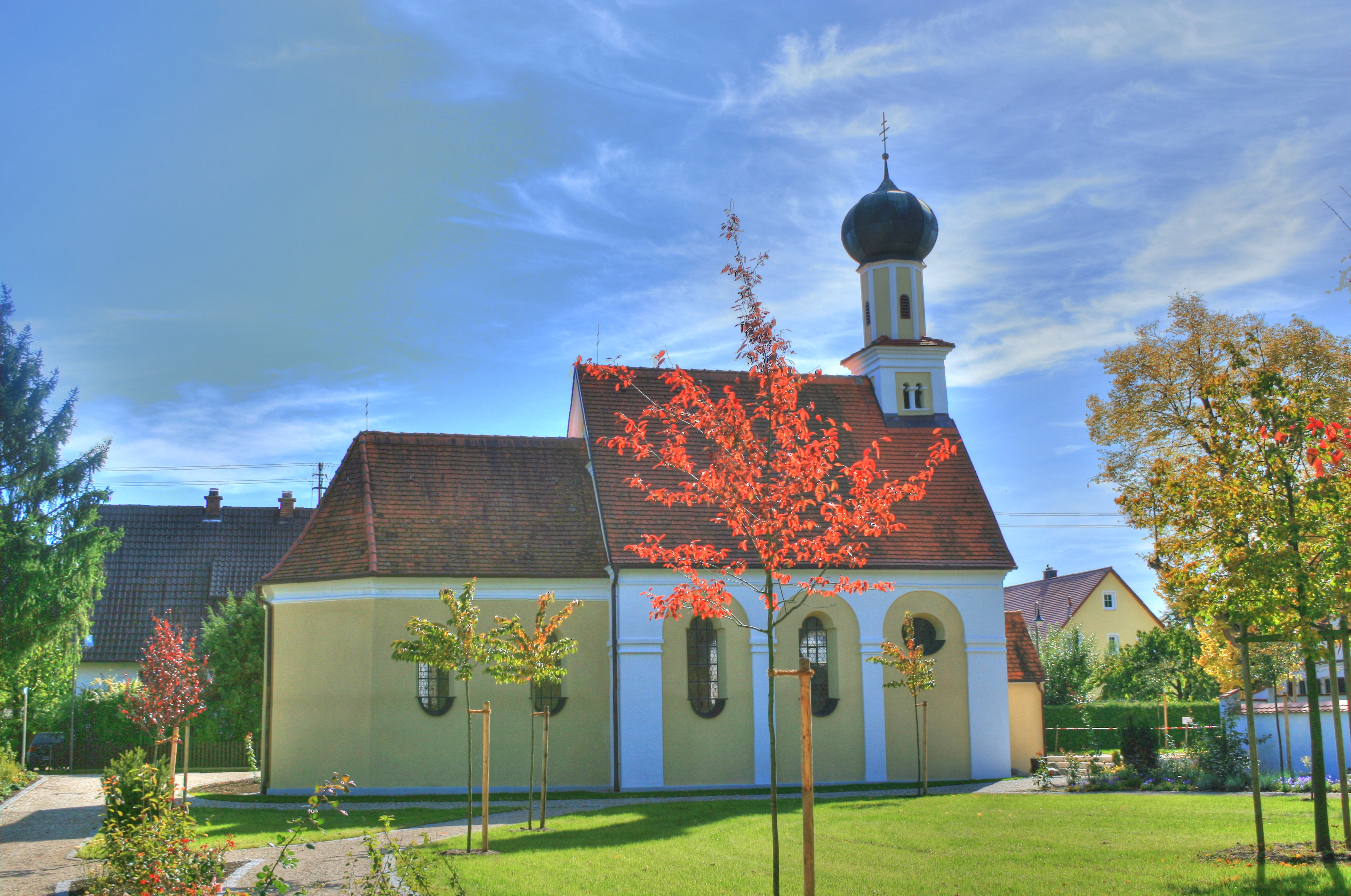 Antoniuskapelle Bäumenheim